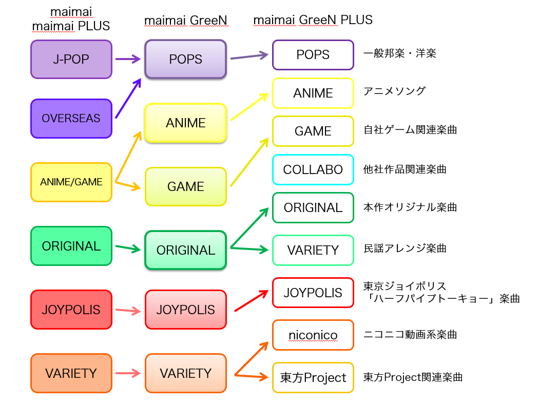 セガのアーケード音楽ゲーム「maimai」の楽曲カテゴリです。 バージョンを重ねることに複雑化しているのでまとめました。